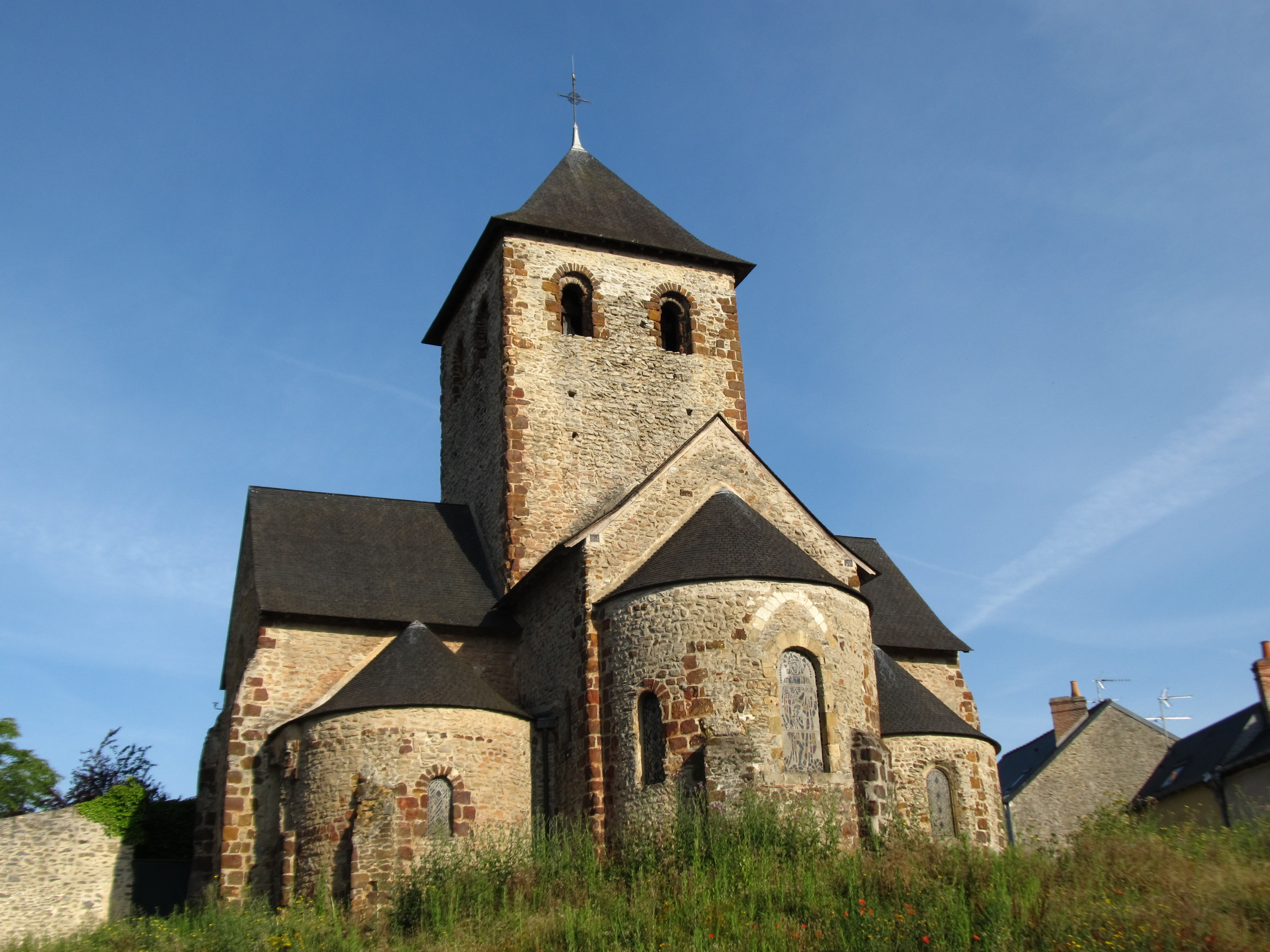 Eglise Saint-Martin, Laval, Mayenne, France .